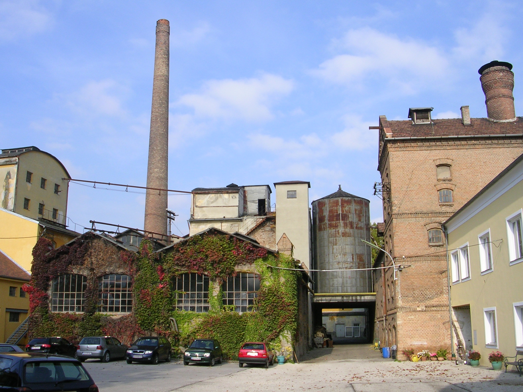 Spillern